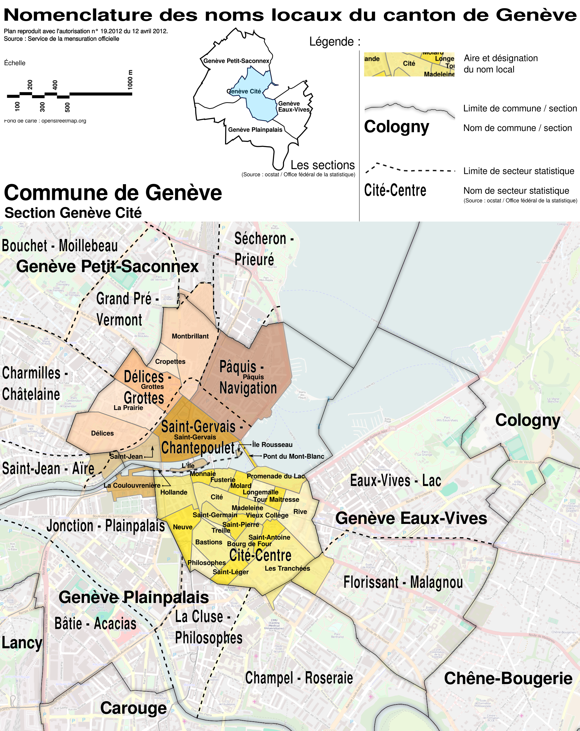 Nomenclature des noms locaux du canton de Genève, généralement appelés "Lieux-dit". Cette nomenclature a été recueillie entre 1932 et 1953 lors de la création du Plan d'Ensemble (PE) du canton de Genève. Plan reproduit avec l'autorisation n° 19.2012 du 12 avril 2012. Source : Service de la mensuration officielle. Noms locaux sur la commune de Genève, section Cité.